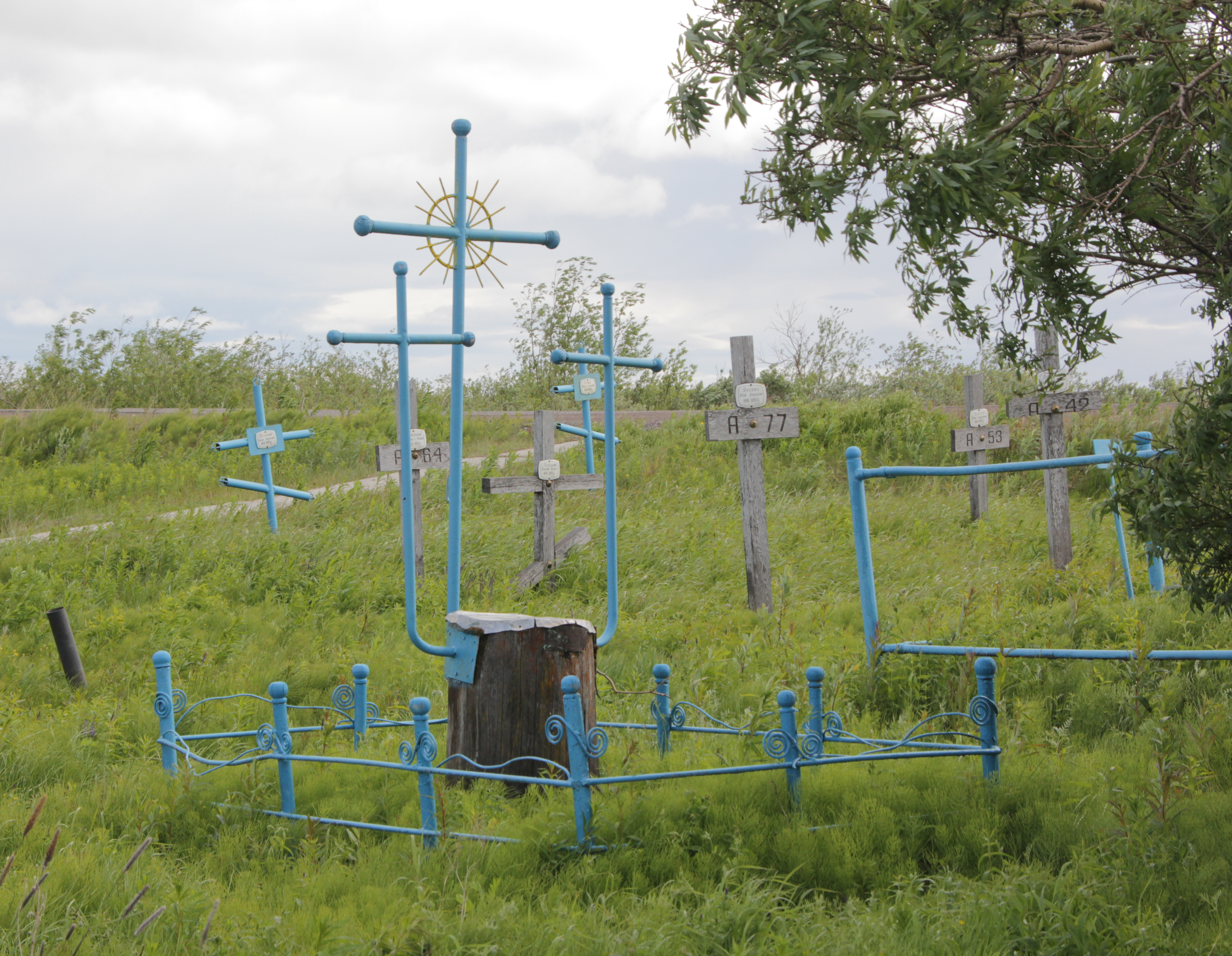 Ein Ausschnitt des kleinen Friedhofs, auf dem die deutschen Kriegsgefangenen beigesetzt wurden, die beim Aufstand von Workuta am 1. August 1953 erschossen wurden. Das Areal liegt einige Kilometer außerhalb von Workuta an einer Verbindungsstraße.